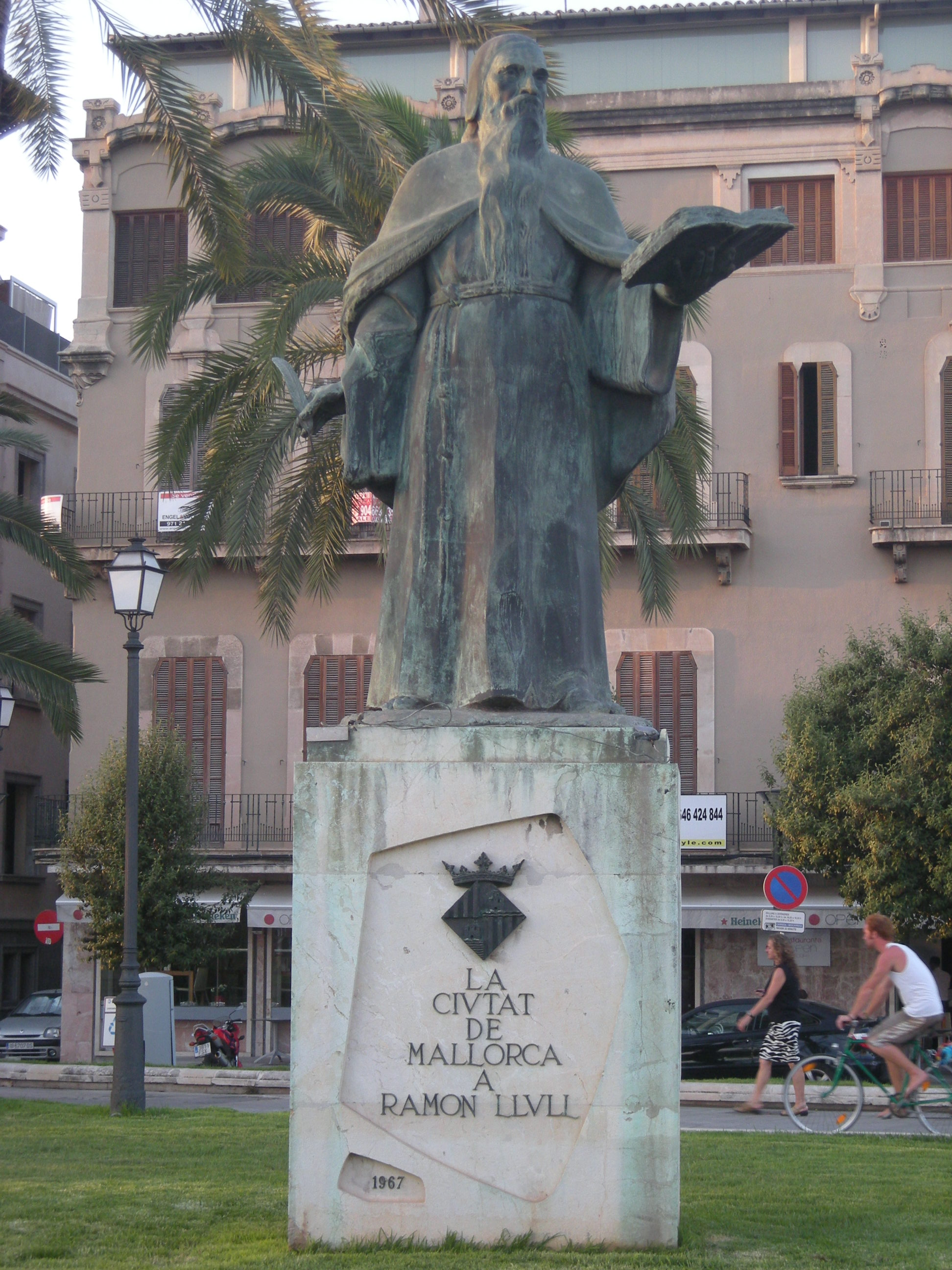 Estàtua de Ramon Llull al Passeig Marítim de Palma